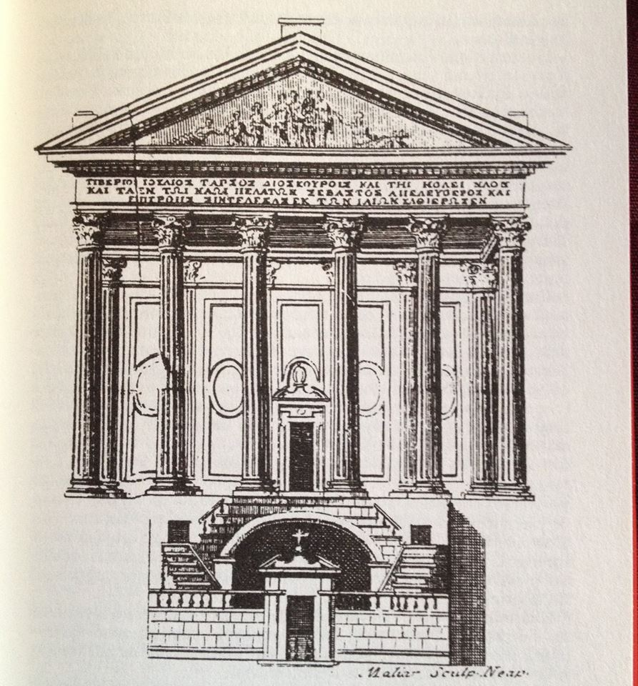 C. Celano "Notizie del bello, dell'antico e del curioso della città di Napoli", Napoli 1724 - facciata di San Paolo Maggiore prima del crollo del 1688.